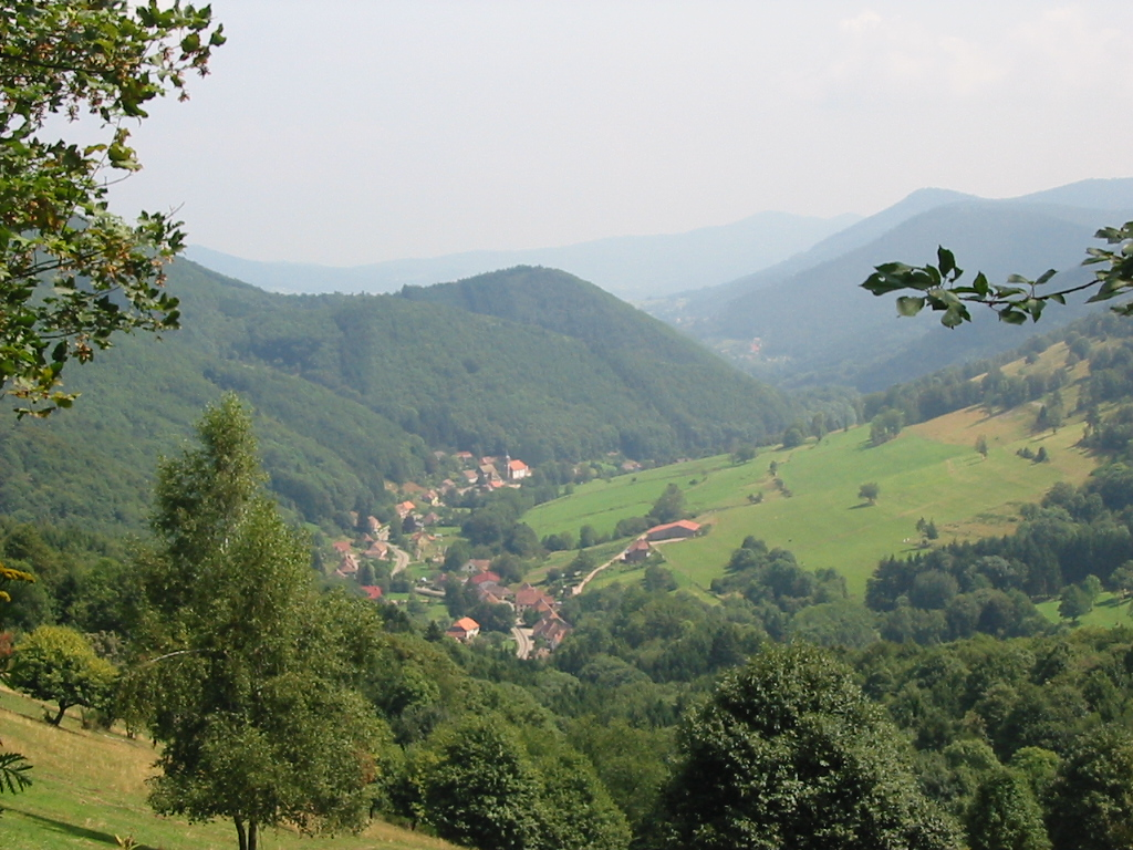 La haute vallée du Giessen vue du Comont, commune d'Urbeis (67)